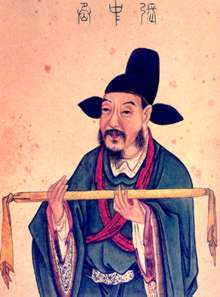 这个图像是中国古代画作。因为艺术家已经死亡超过100年，所以这个图像所展现的平面艺术作品在全世界都属于公共领域，